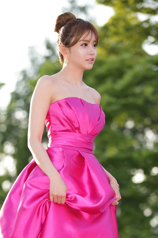 제19회 부천국제판타스틱영화제 레드카펫 part.3